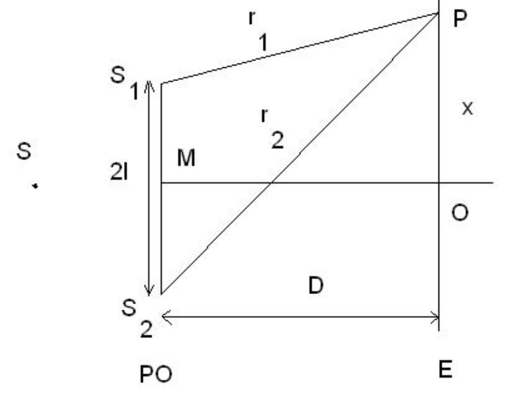 dispozitivulYoung